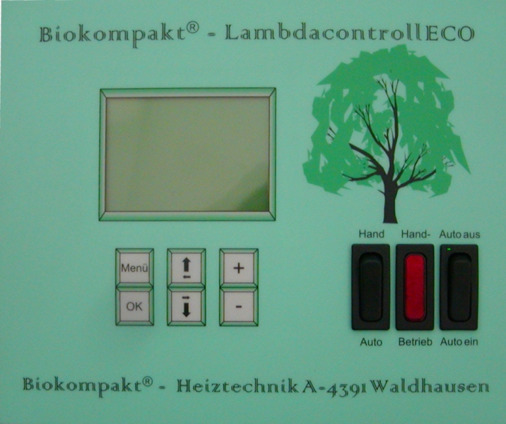 Regelung der Biokompakt Hackschnitzelheizung bzw. Biomasseheizung - Einfach mit Tastendruck zu bedienen. Infos unter Biokompakt Heiztechnik GmbH ist Hersteller von Biomasseheizungen und Hackschnitzelheizungen. Es werden Komplettlösungen bis zum Staubfilter angeboten.